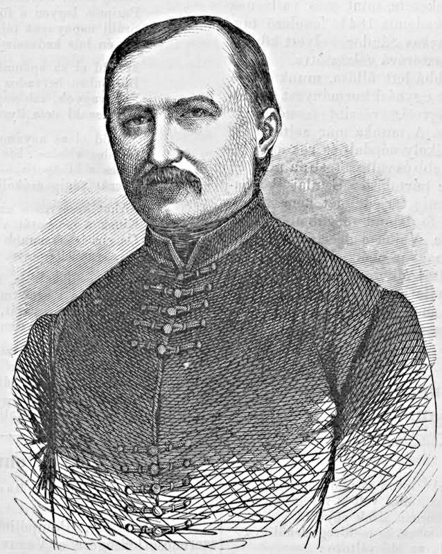 Kriza János (1811–1875) néprajzkutató, költő, műfordító, unitárius püspök, a Magyar Tudományos Akadémia tagja (Vasárnapi Ujság, 1862. május 18.)